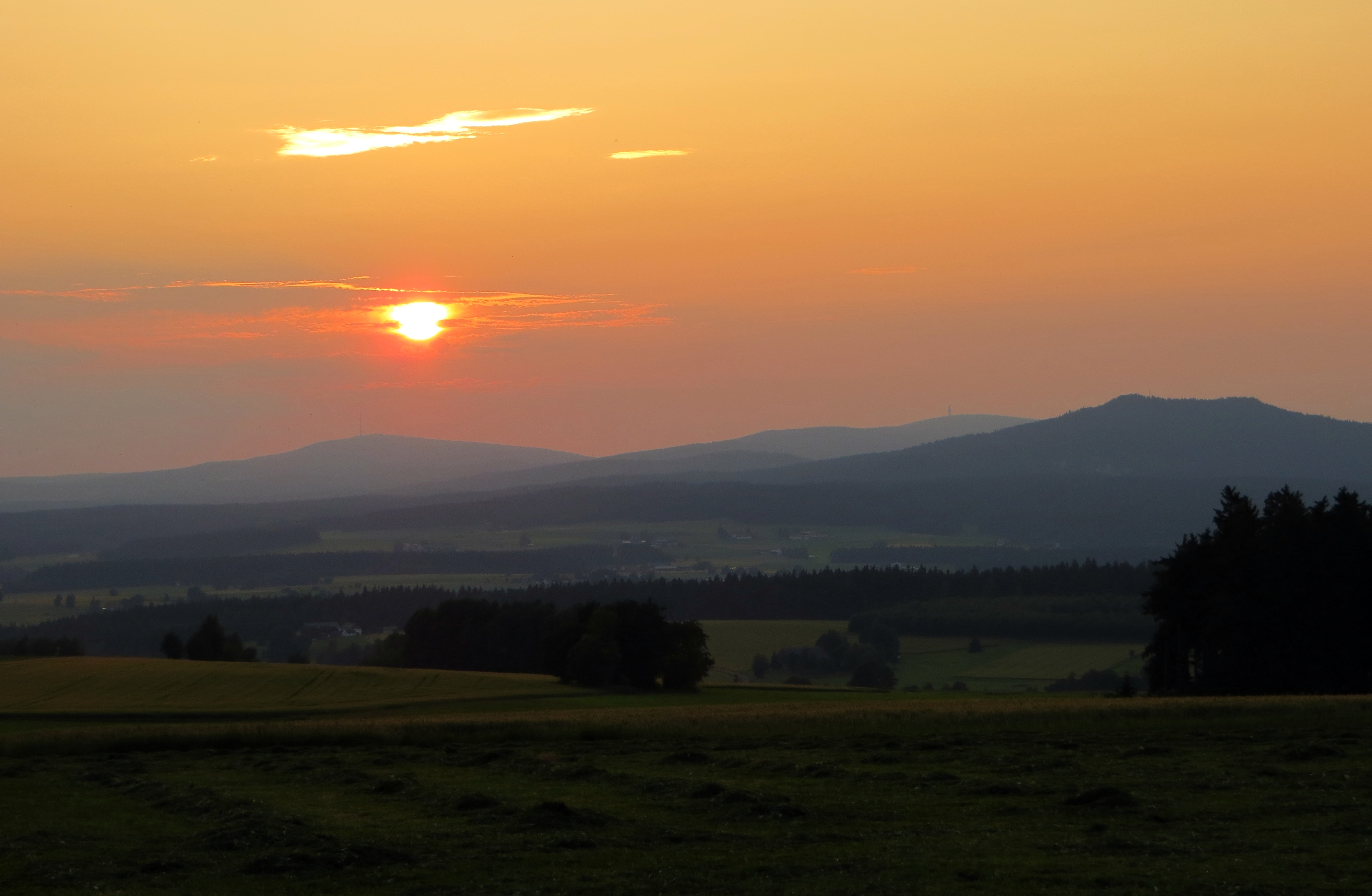 Blick auf das Fichtelgebirge ( v. l. n. r. ) Ochsenkopf 1024 m, Schneeberg 1051 m & Kösseine 939 m